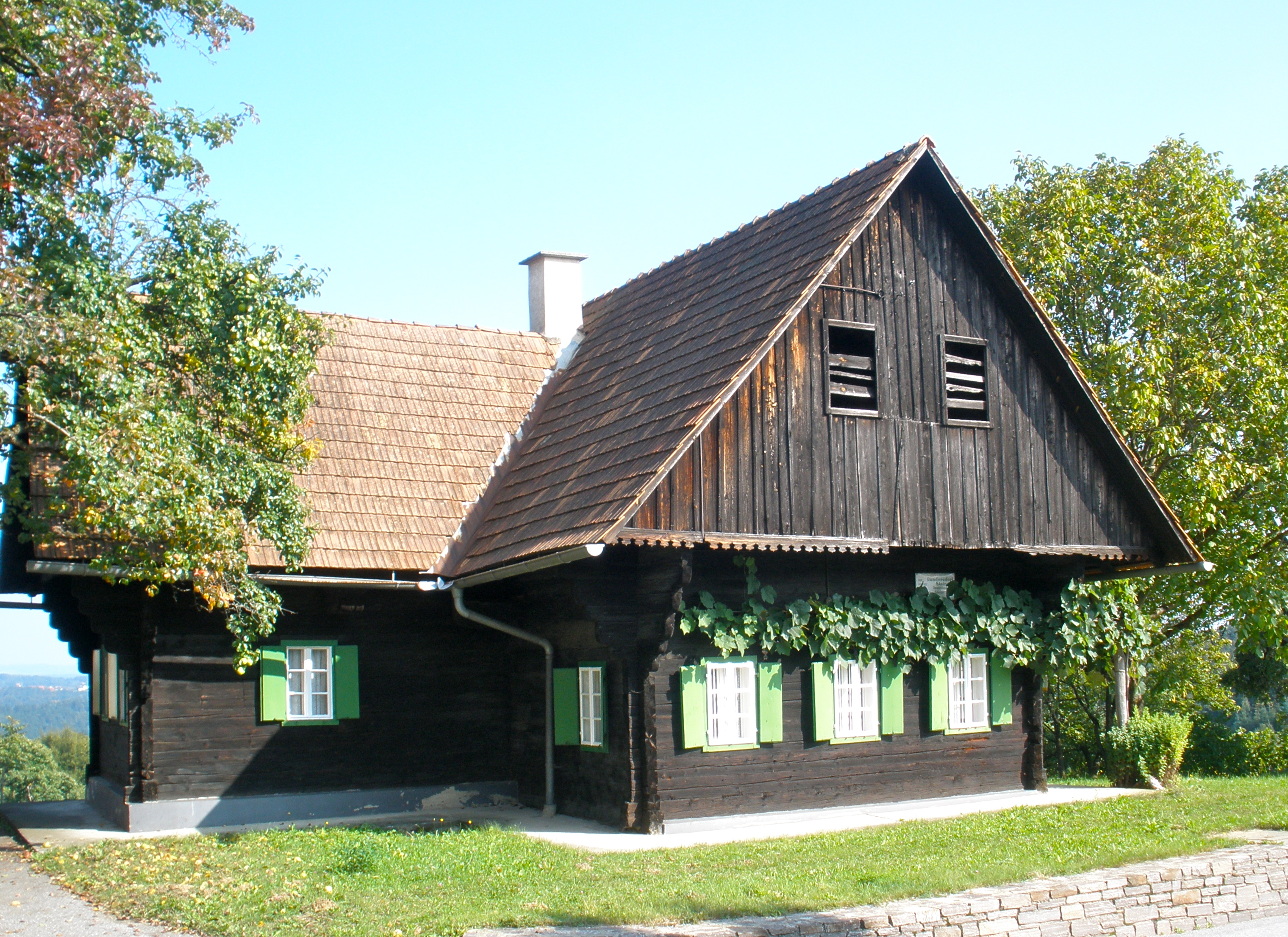 Haus an der Schilcher-Weinstraße in Gundersdorf, Weststeiermark